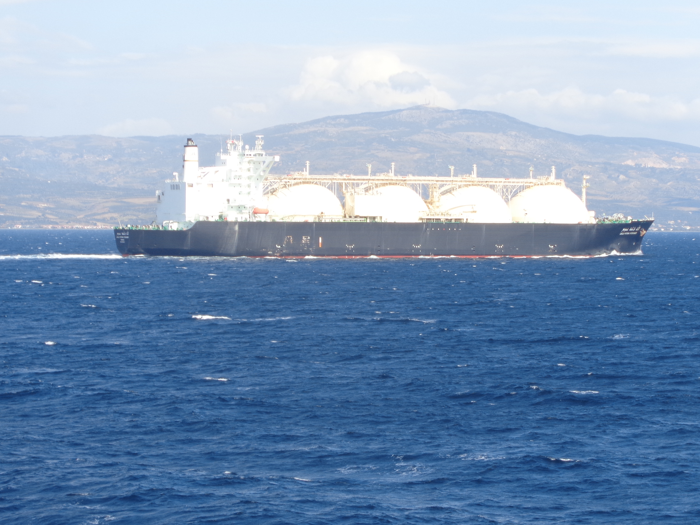 Algerischer Flüssiggastanker Laila Fatma N'Soumer in den Dardanellen